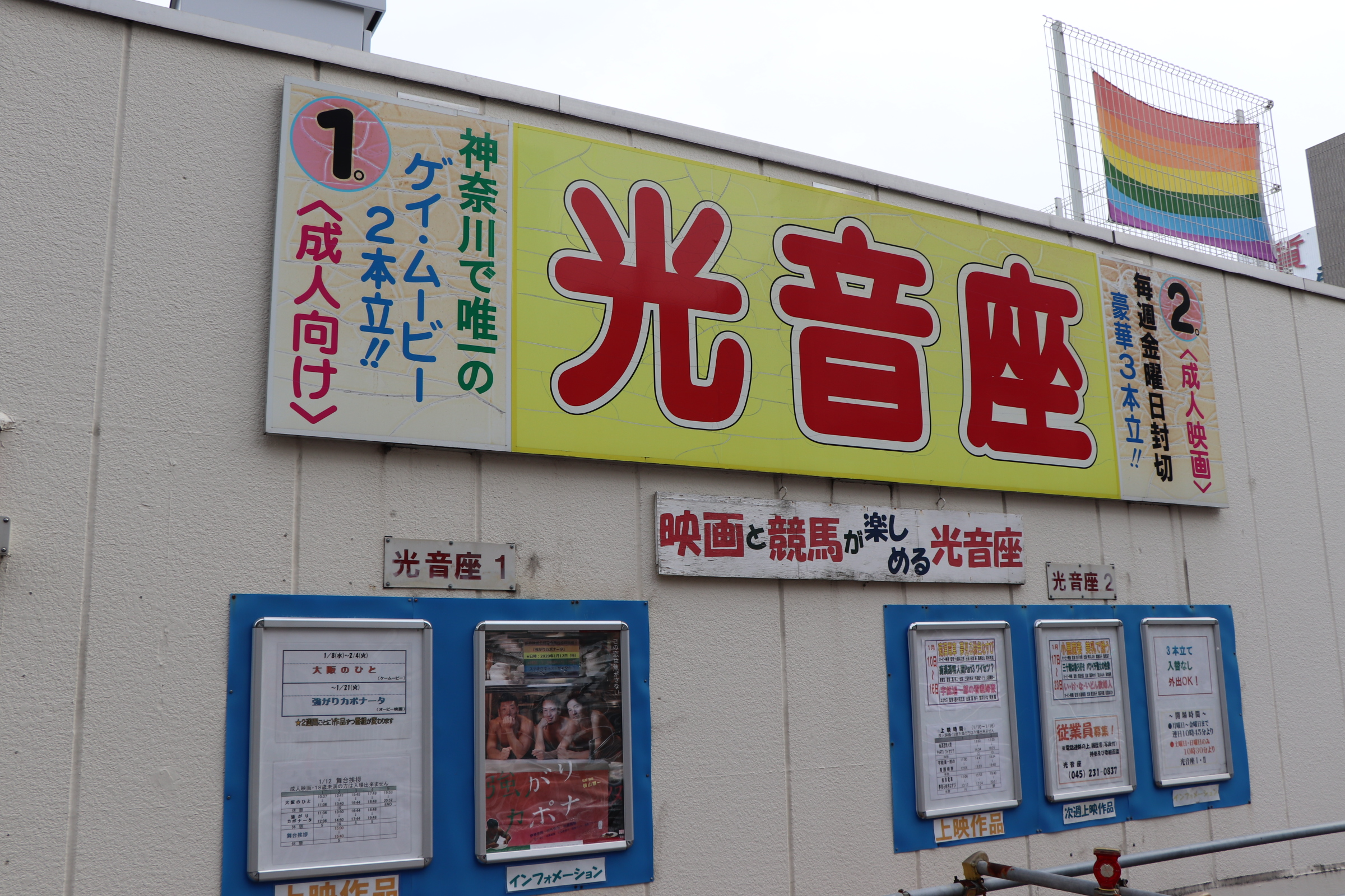 横浜光音座